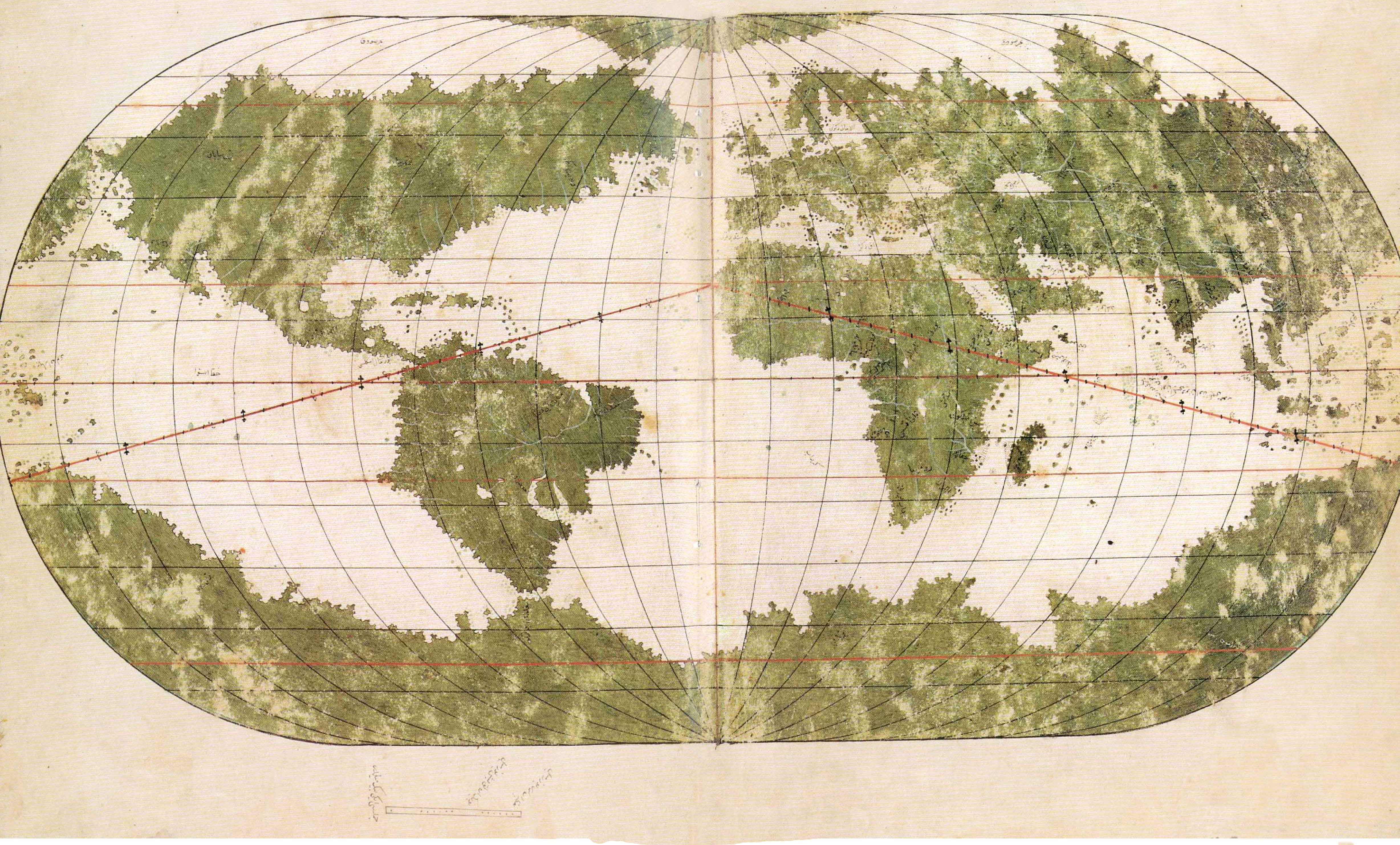 Denizci ve kartograf Ali Macar Reis'in hazırladığı Ali Macar Reis Atlası olarak bilinen atlasta yer alan Dünya haritası.